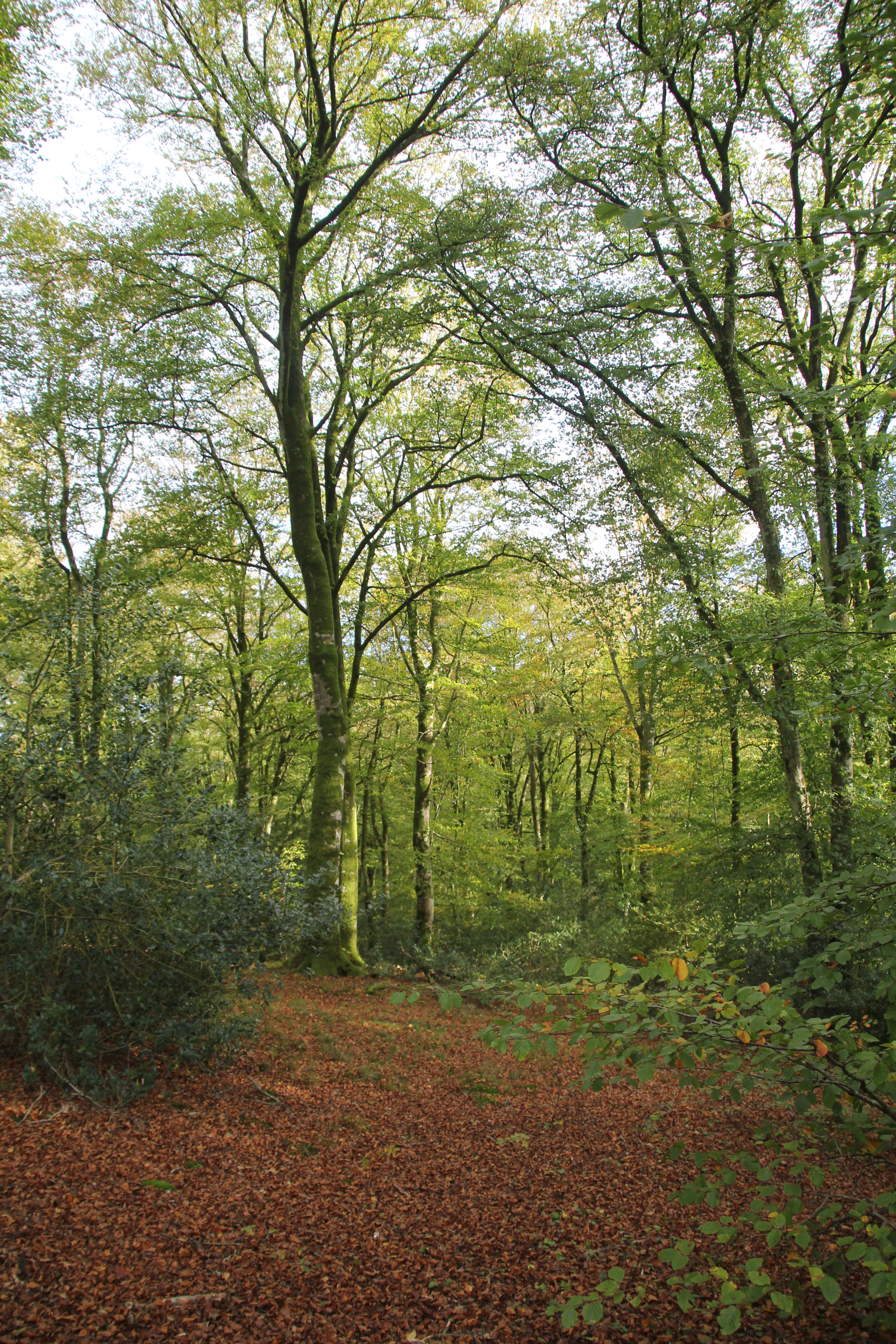 Forêt domaniale de Cerisy-la-Forêt (Manche, France).